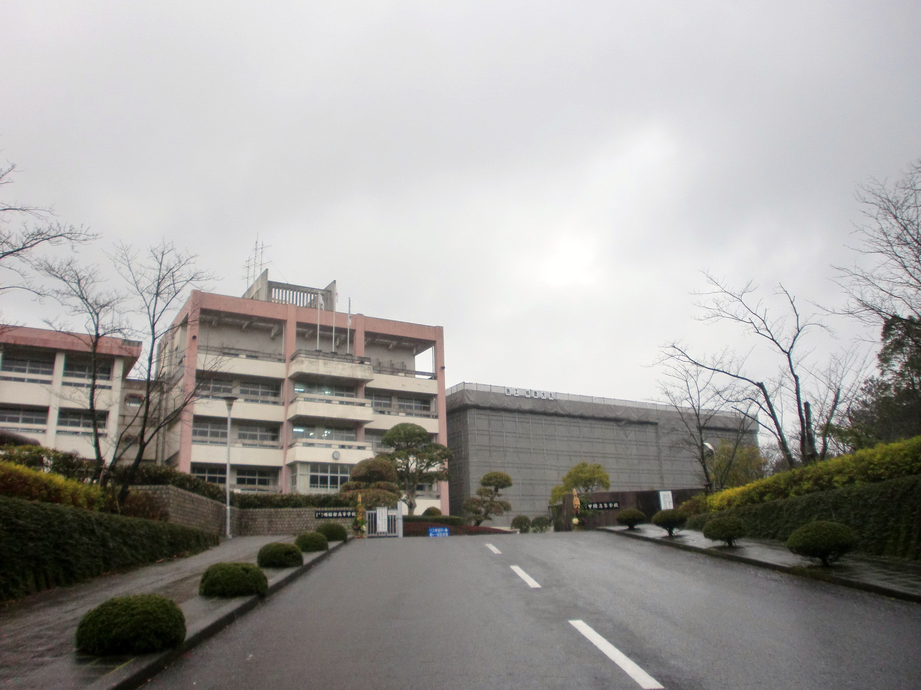 鹿児島県立明桜館高等学校、鹿児島県立甲陵高等学校の外観。